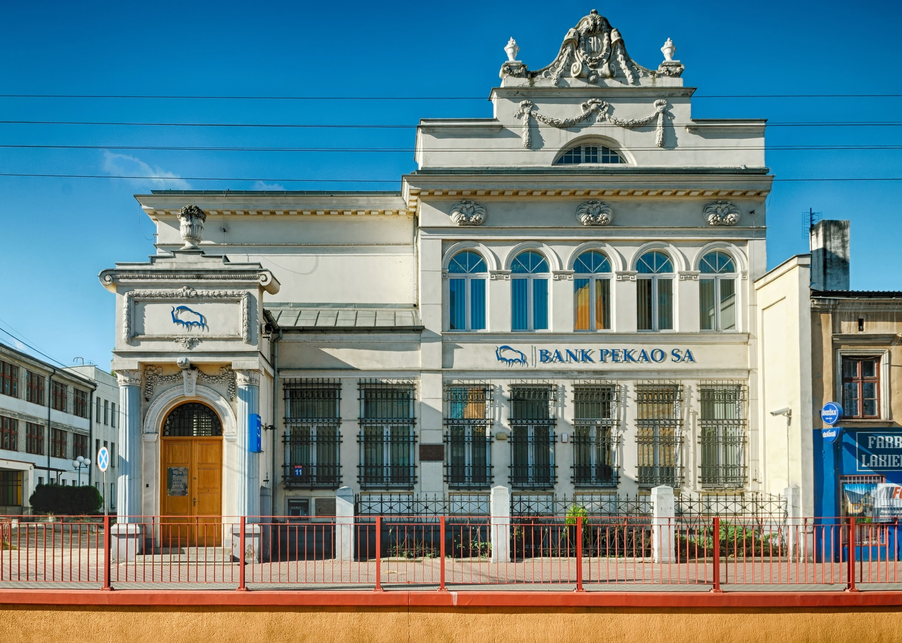 bank, ul. 1 Maja 11, 1915 Żyrardów, Żyrardów 03.1984.